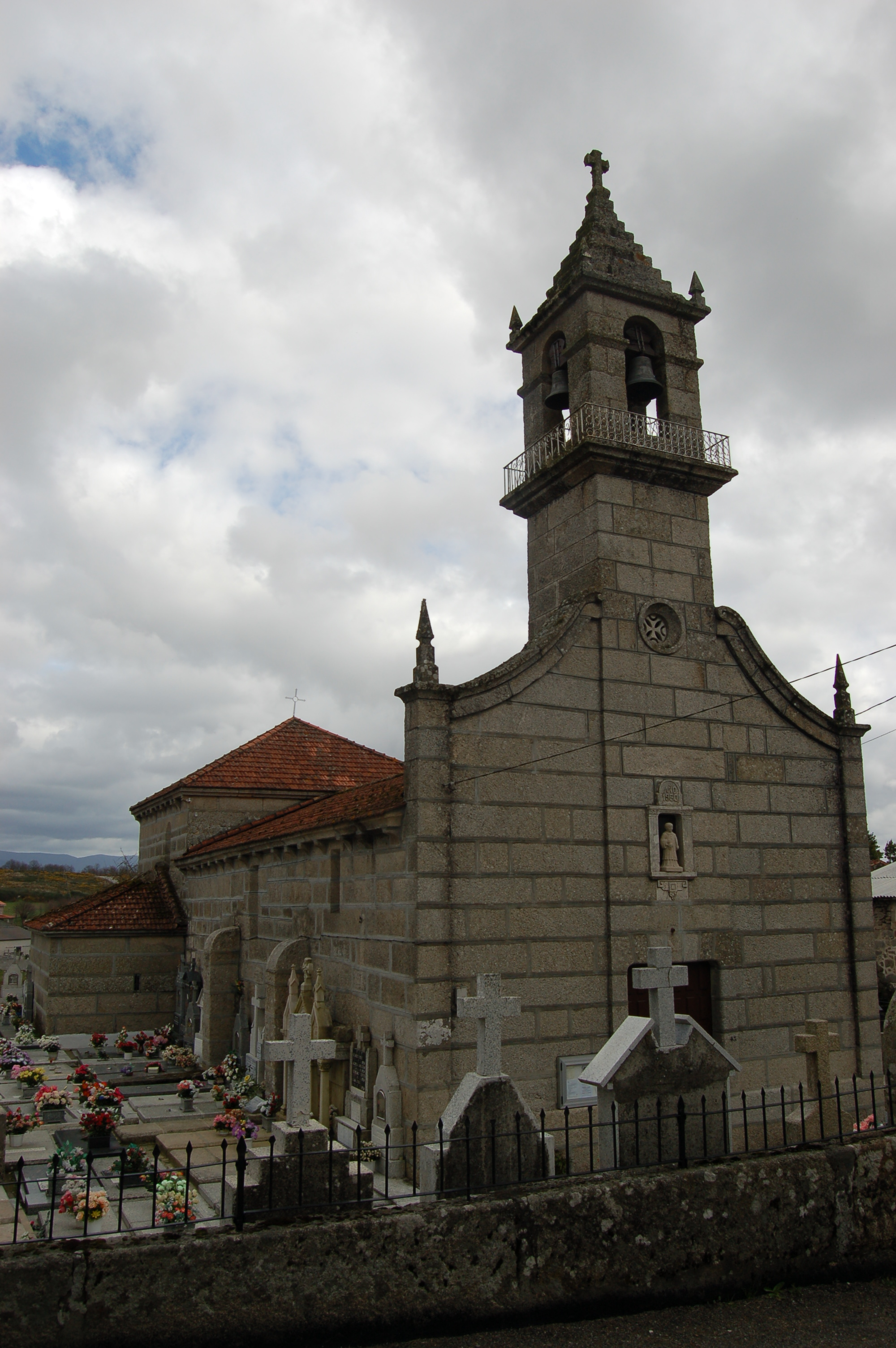 igrexa parroquial de San Vicente da Abeleda, en Xunqueira de Ambía